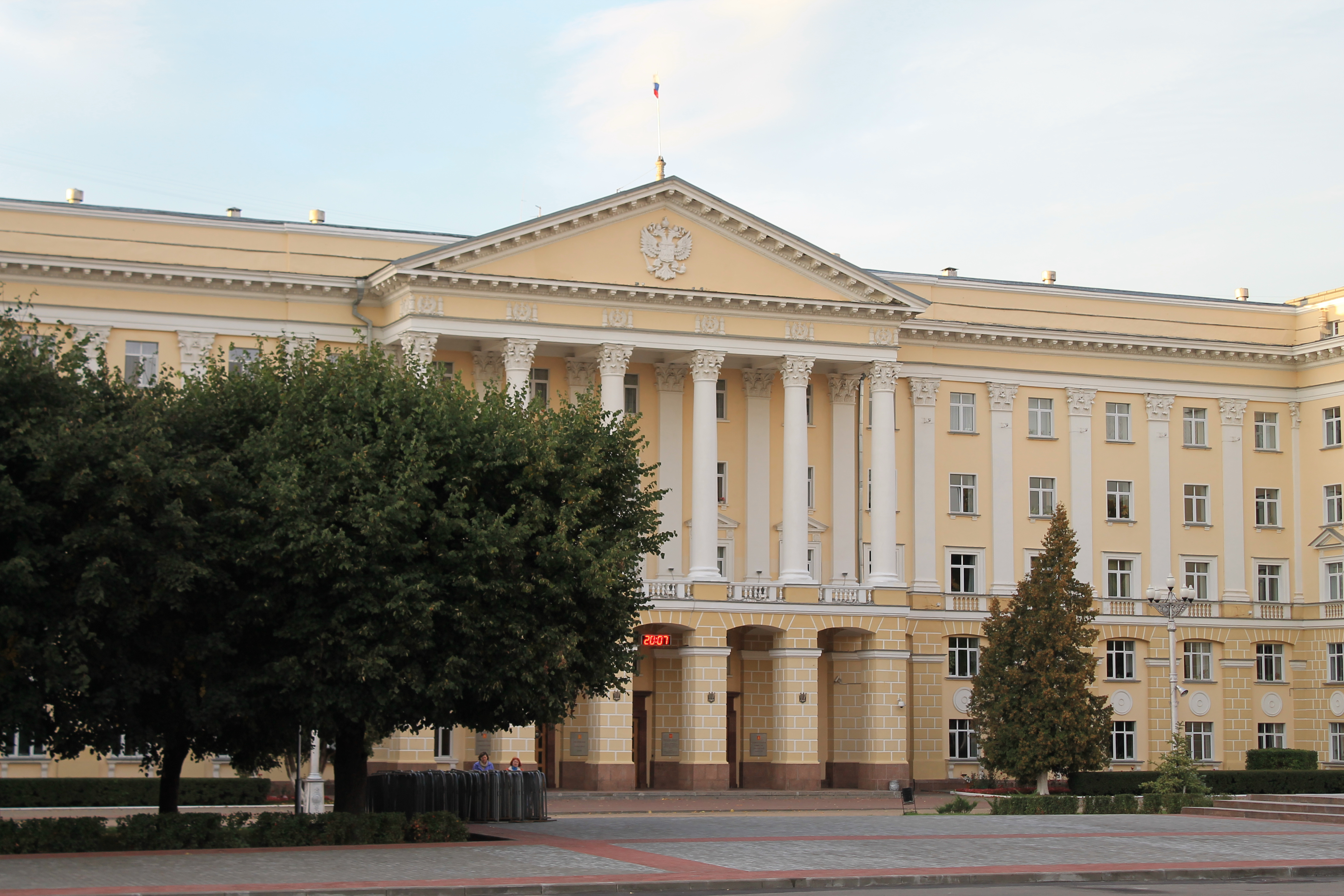 Здание дома советов (Смоленская область, Смоленск, улица Ленина, 1)